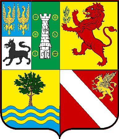 escudo de la familia Oria de Rueda (Requena)